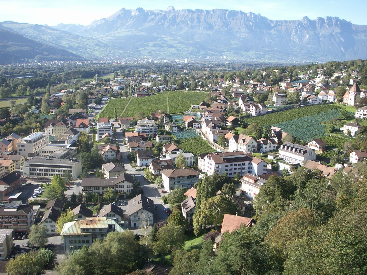 Панорамен изглед от Вадуц.